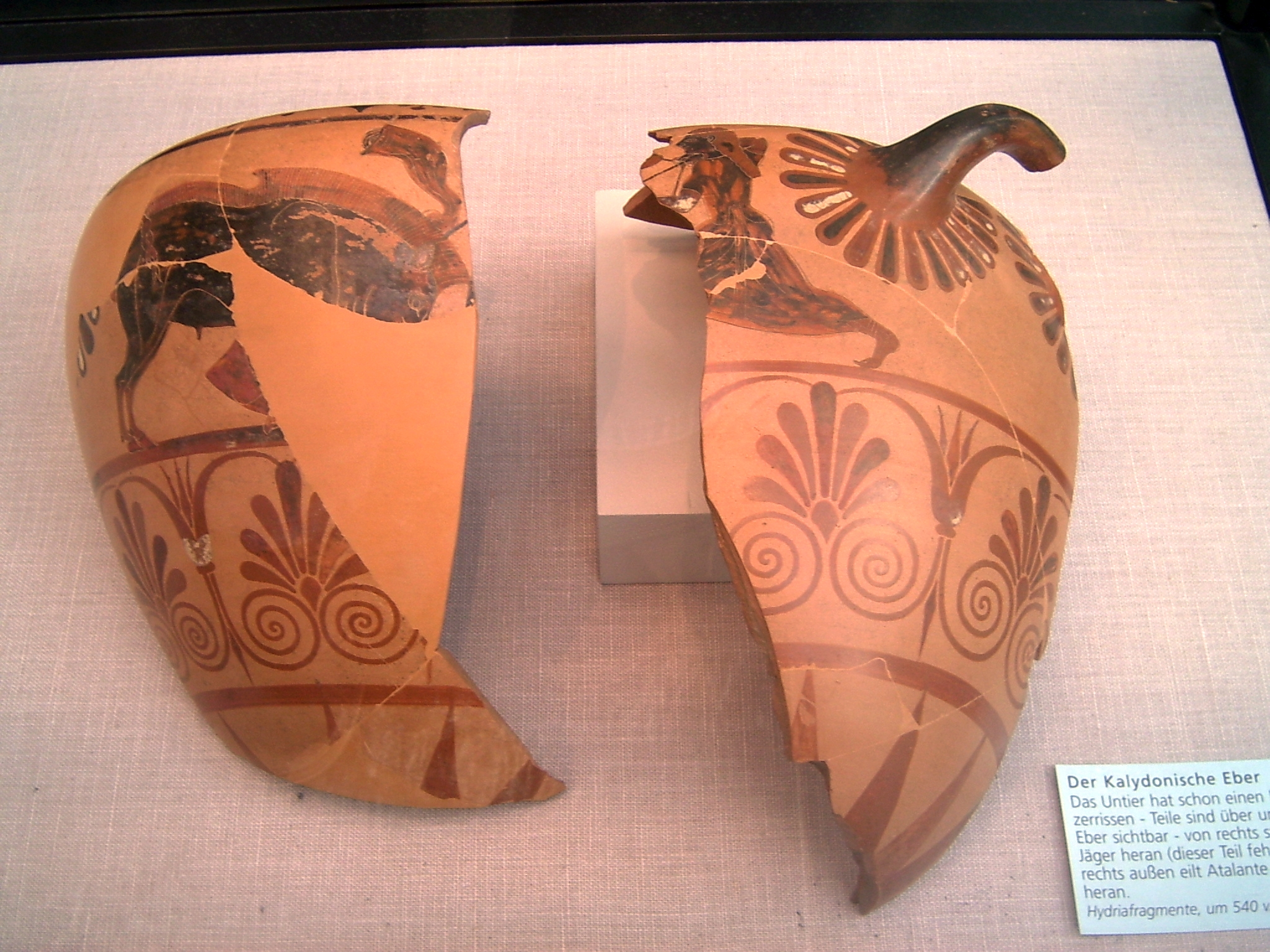 Schwarzfigurige Caeratner Hydria des Adler-Malers mit der Darstellung Atalantes bei der Kalydonischen Eberjagd, um 540 v. Chr., Höhe 30 cm, Staatliche Antikensammlungen, Inventarnummer 9466